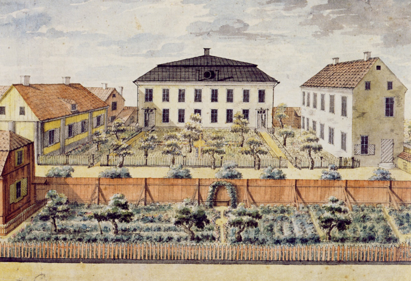 Fastigheten KATTHAVET 7. Kvarteret KATTHAVET. Evangeliske Brödernas Bönesal. Jakobs församling. Kungsträdgårdsgatan 12. Norrmalm.